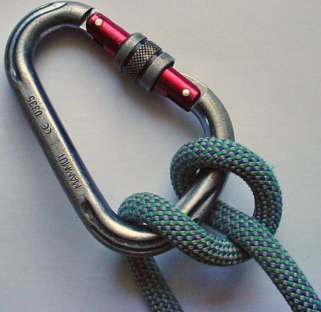 Bild des HMS eigenes foto vom 28.03.2004 Bildinfo: 640 x 623 Pixels 16,7 Millions (24 BitsPerPixel) 42.24 KB (43252 Bytes) JPG/JFIF, progressive